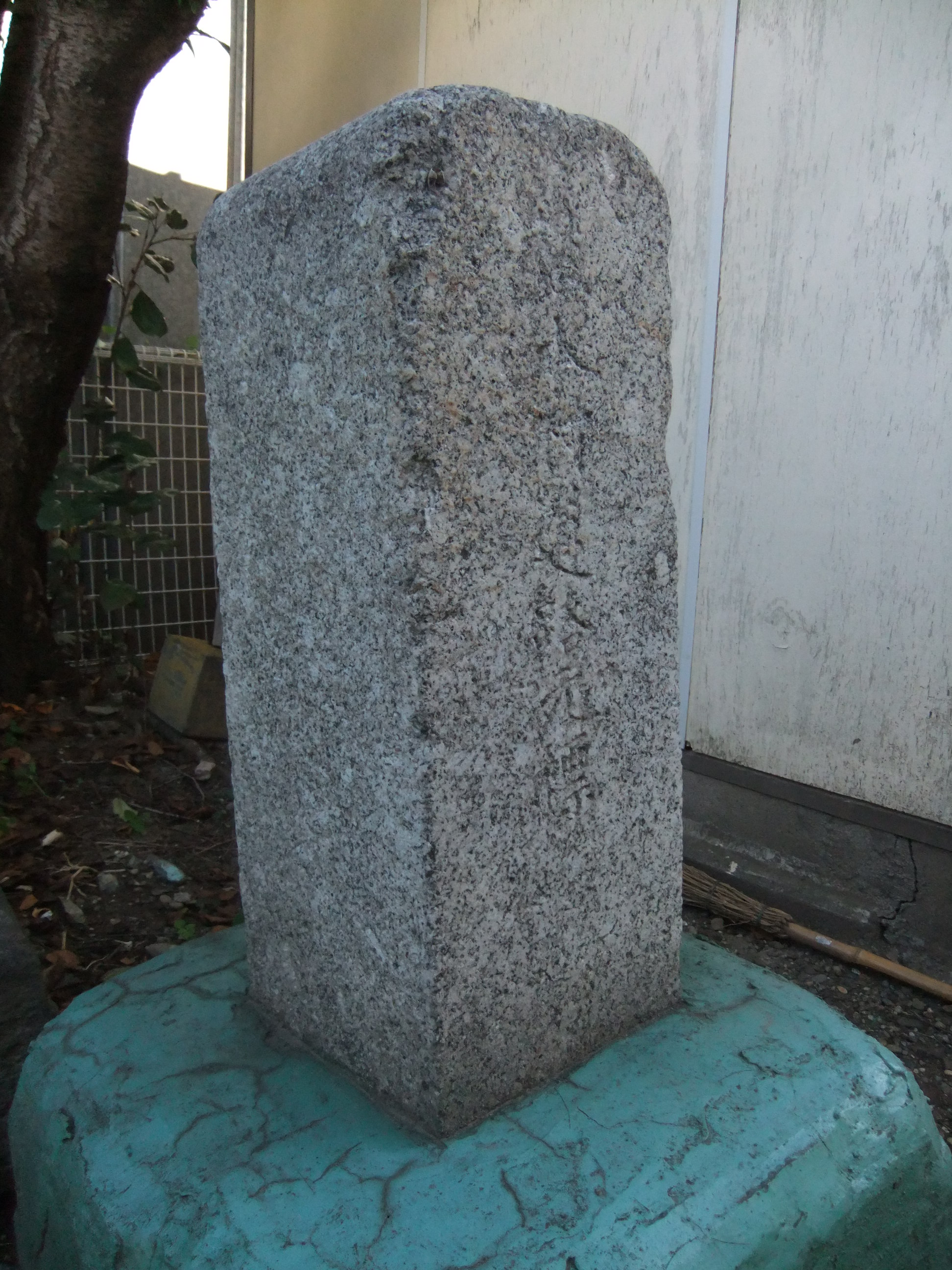 埼玉県北足立郡植水村の道路元標。植水村役場跡（さいたま市植水支所・植水公民館，西区中野林173-2）に現存。